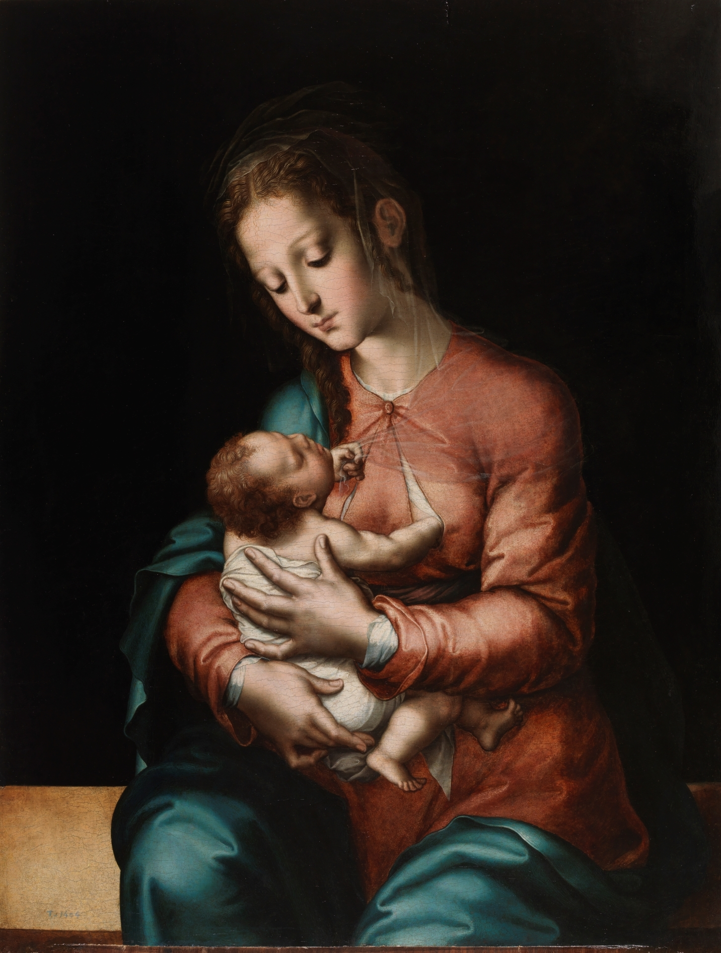 La obra representa a la Virgen María amamantando a su hijo, el Niño Jesús, y es una de las obras más conocidas del pintor extremeño Luis de Morales, que falleció en 1586.